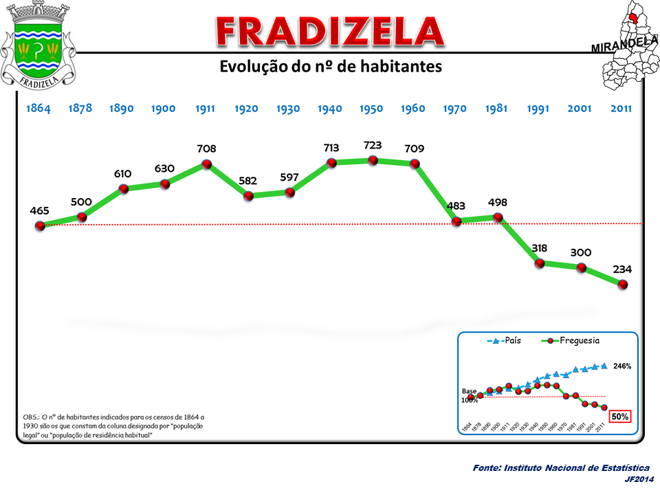 Evolução da População 1864 / 2011